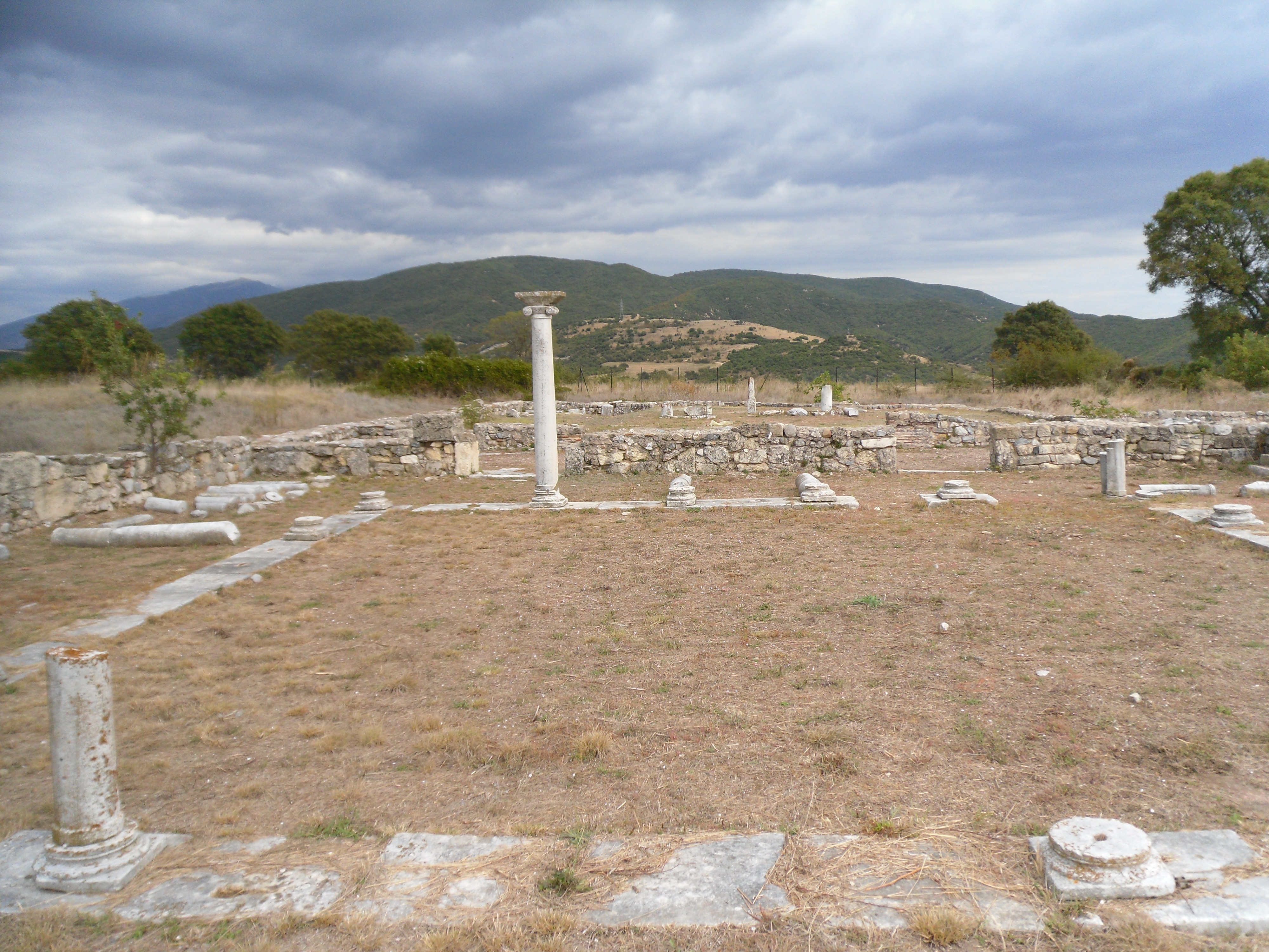 Τρίκλιτη δρομική βασιλική με νάρθηκα και τετράστωο αίθριο. Το κεντρικό κλίτος και ο νάρθηκας έφεραν μαρμάρινο δάπεδο. Τα πλάγια κλίτη είχαν πήλινες πλάκες. Μπροστά από την κυκλική αψίδα διατηρείται ο στυλοβάτης του τέμπλου. Οι κίονες στέφονταν με σύνθετα ιωνικά κιονόκρανα με χαρακτό σταυρό πλαισιωμένο από τρίλοβο φυτικό σχέδιο. Χρονολογείται στο 2ο μισό του 5 αιώνα μ.Χ.«Παλαιοχριστιανική Αμφίπολις»